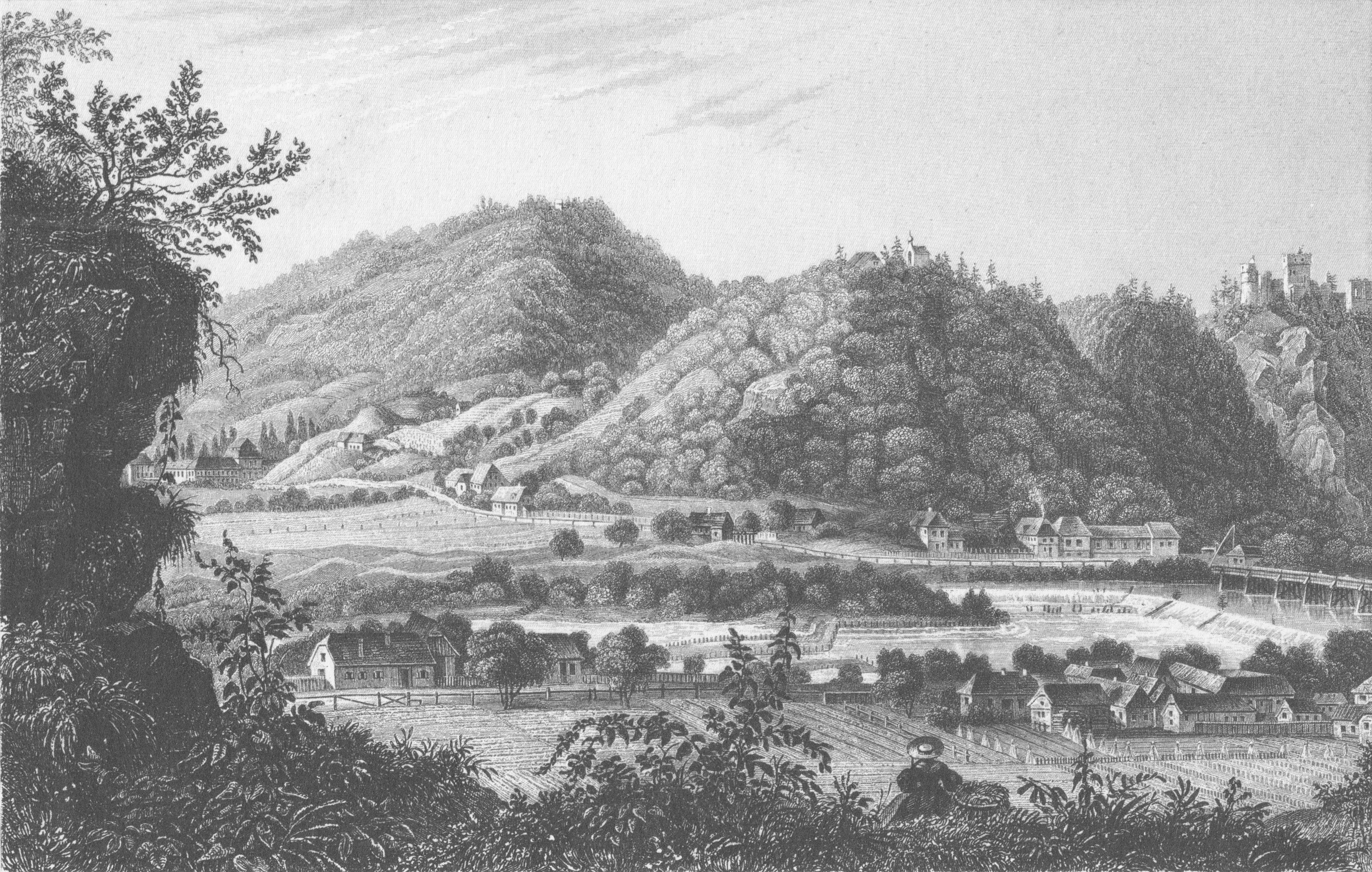 Die Weinzettel-Brücke.